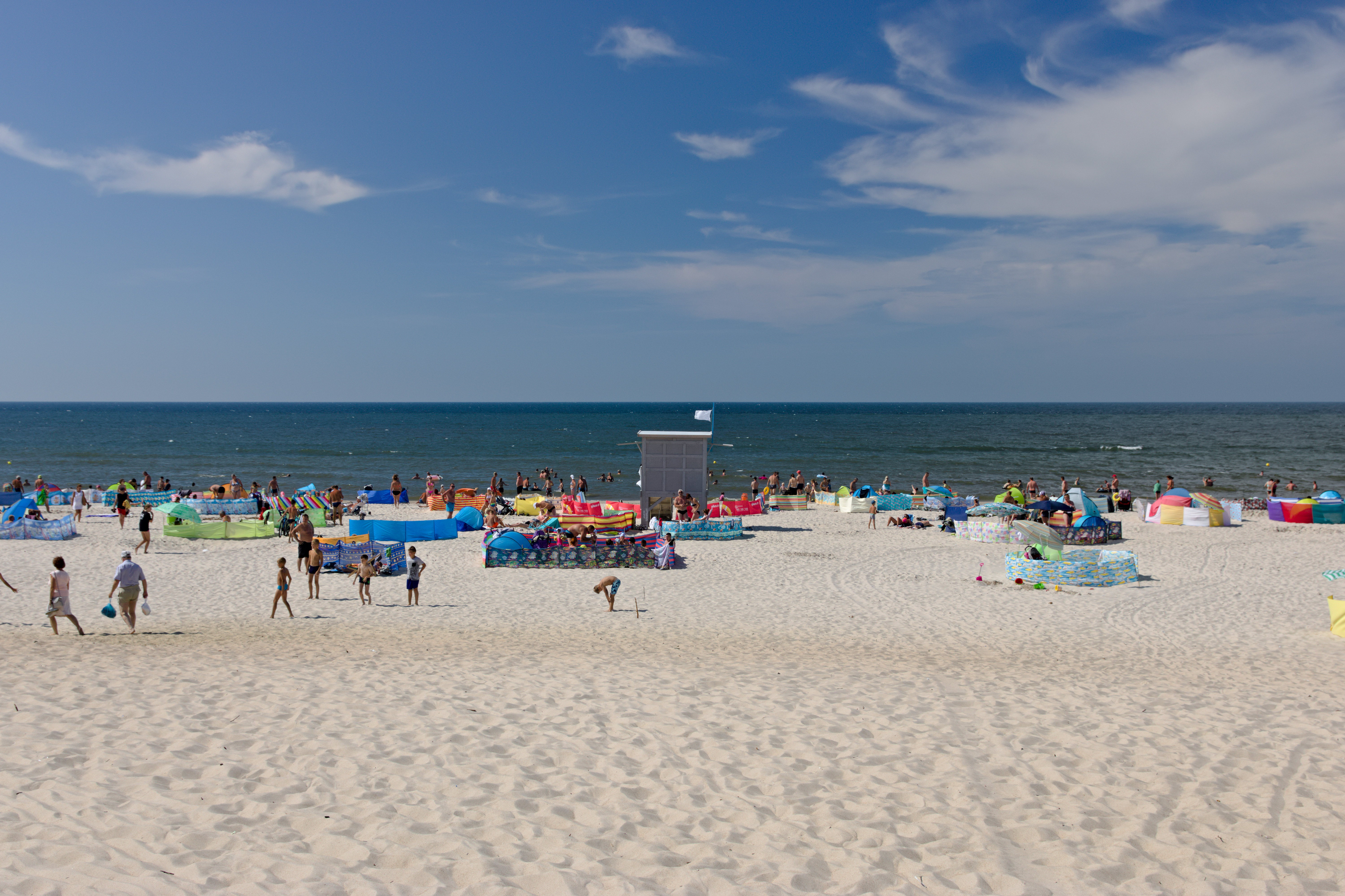 Plaża w Rowach